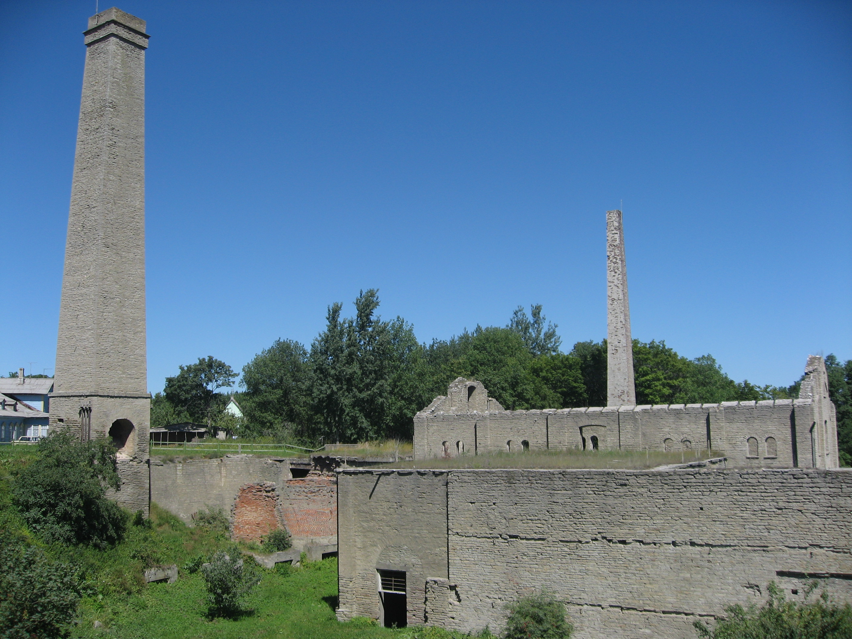 Česky: Kunda